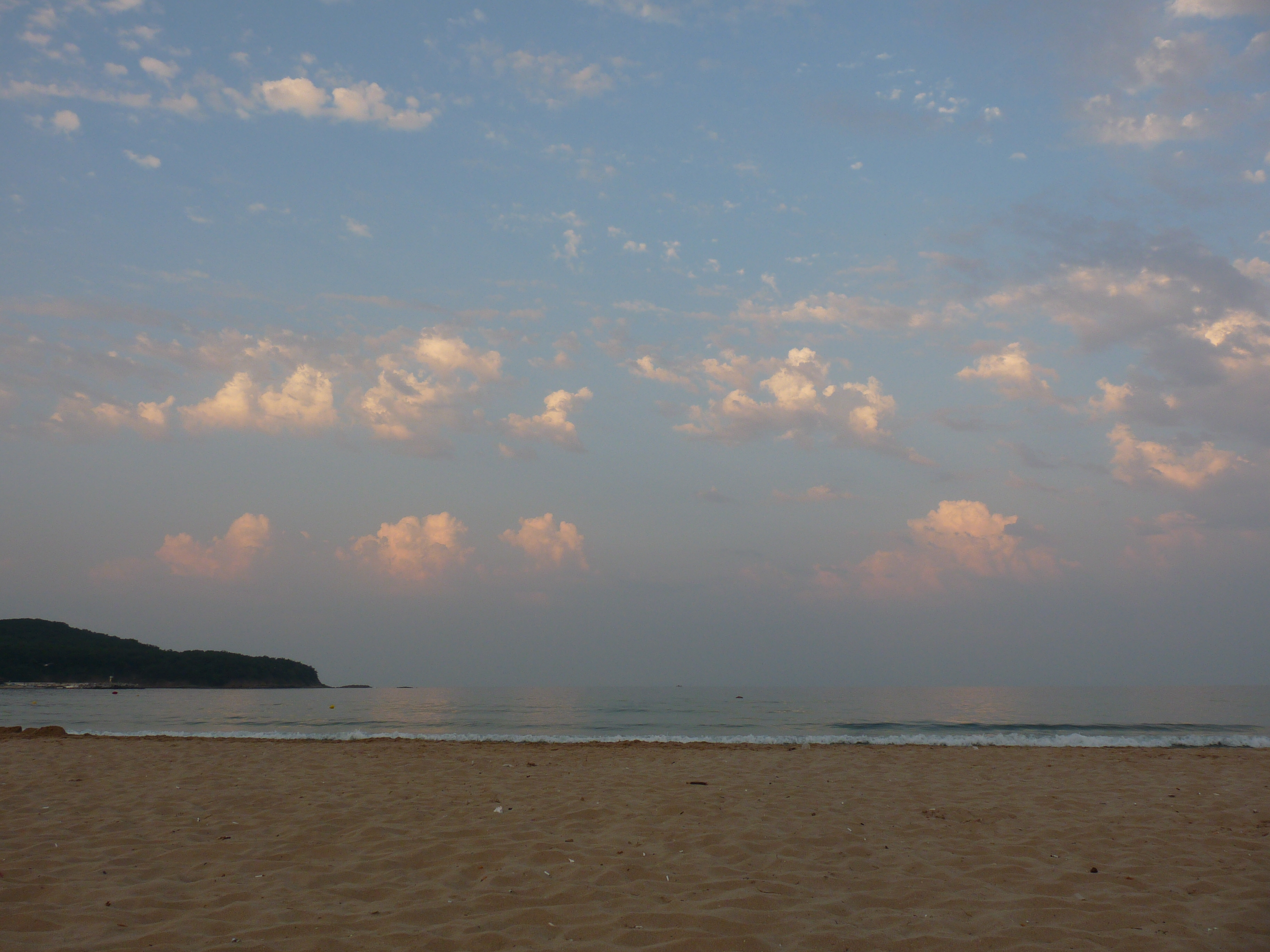 Ропотамо, Плажът при защитена местност Стамополу - лято 2010